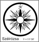 Szélrózsa